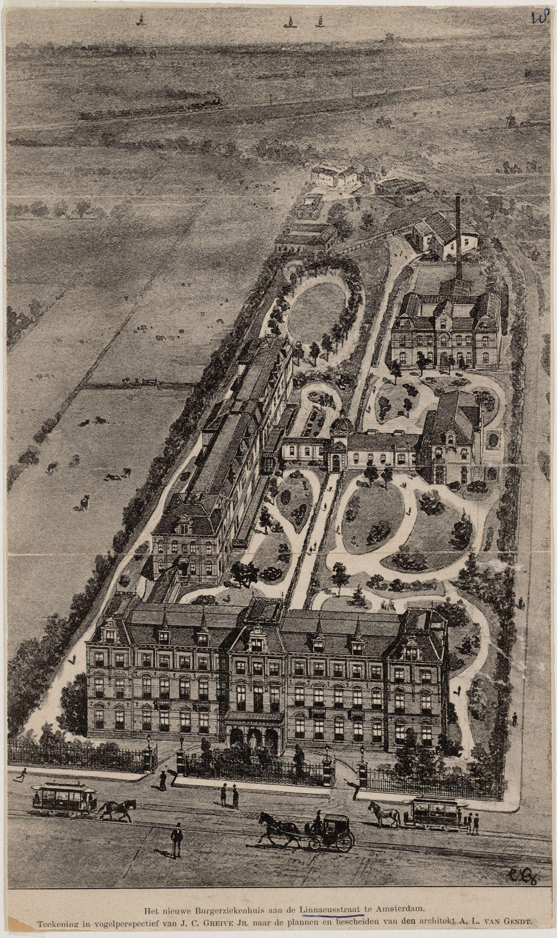 Beschrijving Het nieuwe Burgerziekenhuis aan de Linnaeusstraat te Amsterdam Tekening in vogelperspectief van het Burgerziekenhuis, Linnaeusstraat 89. Reproductie in rasterdruk naar een tekening door J.C. Greive jr. naar het ontwerp van A.L. van Gendt. Documenttype prent Vervaardiger Greive jr, Johan Conrad (1837-1891) Gendt, A.L. van (Dolf, 1835-1901, architect) Collectie Collectie Stadsarchief Amsterdam: los beeldmateriaal Geografische naam Linnaeusstraat Inventarissen Afbeeldingsbestand 010194001846